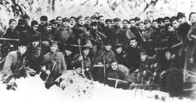 4 kompania 2 batalionu 2 Pułku Piechoty Legionów Armii Krajowej (dawny oddział "Jędrusiów") przed rozwiązaniem oddziału. Ostatnie zdjęcie wykonane w lasach Siekierzyńskich.